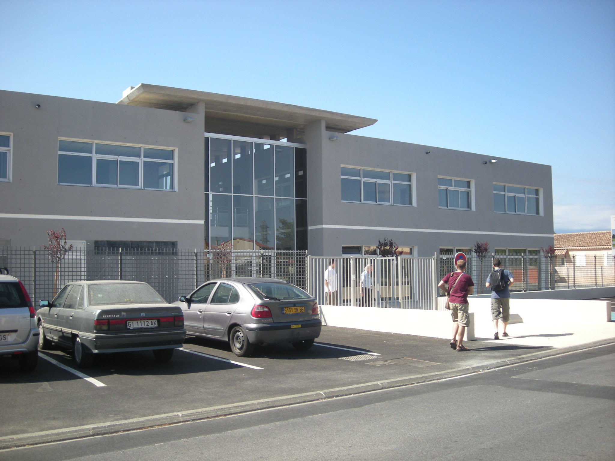 Edifici del liceu de la Bressola a El Soler, Catalunya Nord.